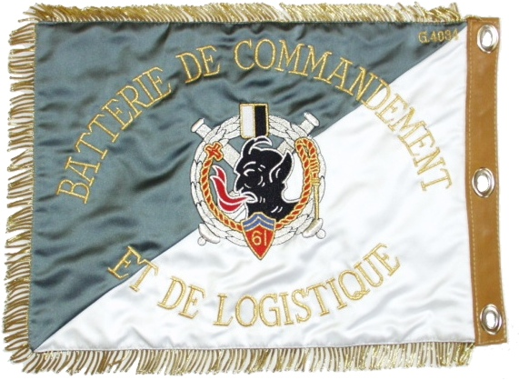 fanion